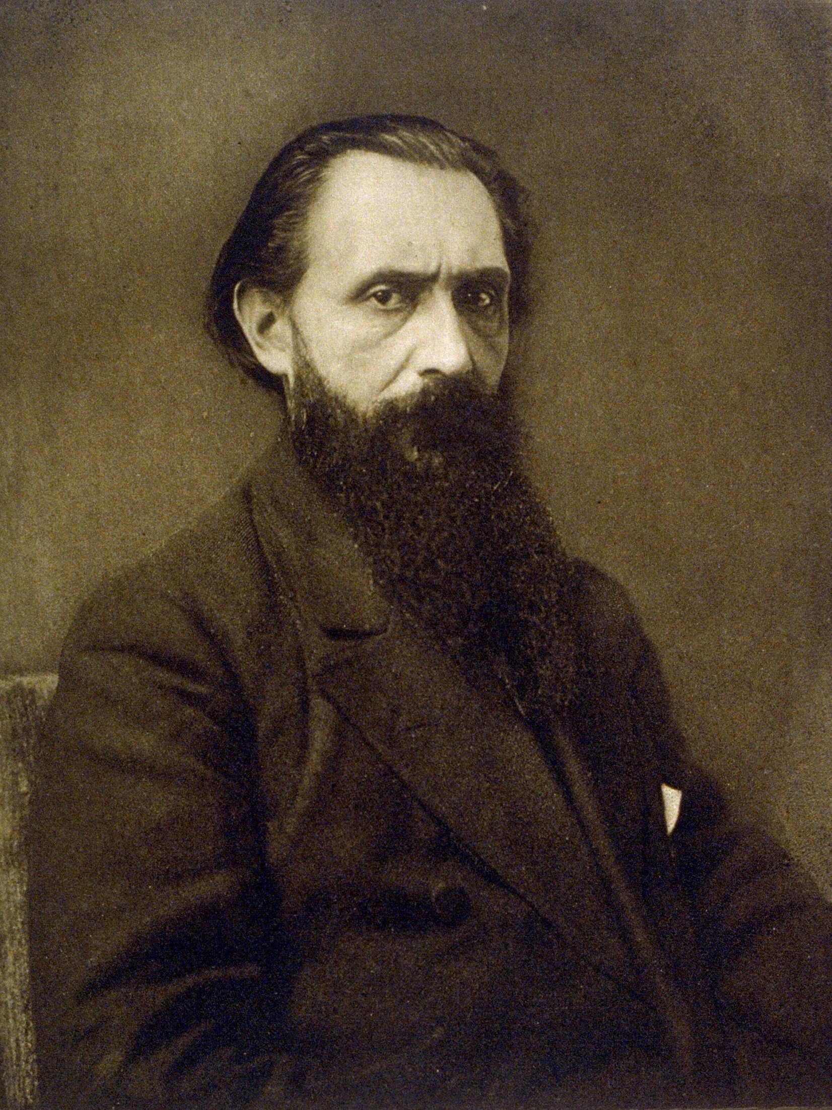 Portrait of Lucien Capet, photogravure 14.3 x 10.8 cm (image)